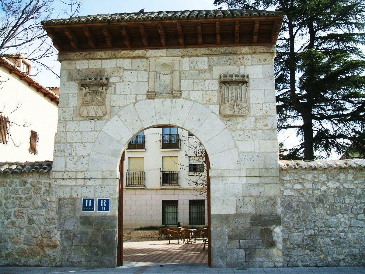 Puerta de acceso ("Arco de la Tapia") al antiguo Convento de Santa Clara, en Peñafiel, Valladolid, España, hoy habilitado como hotel